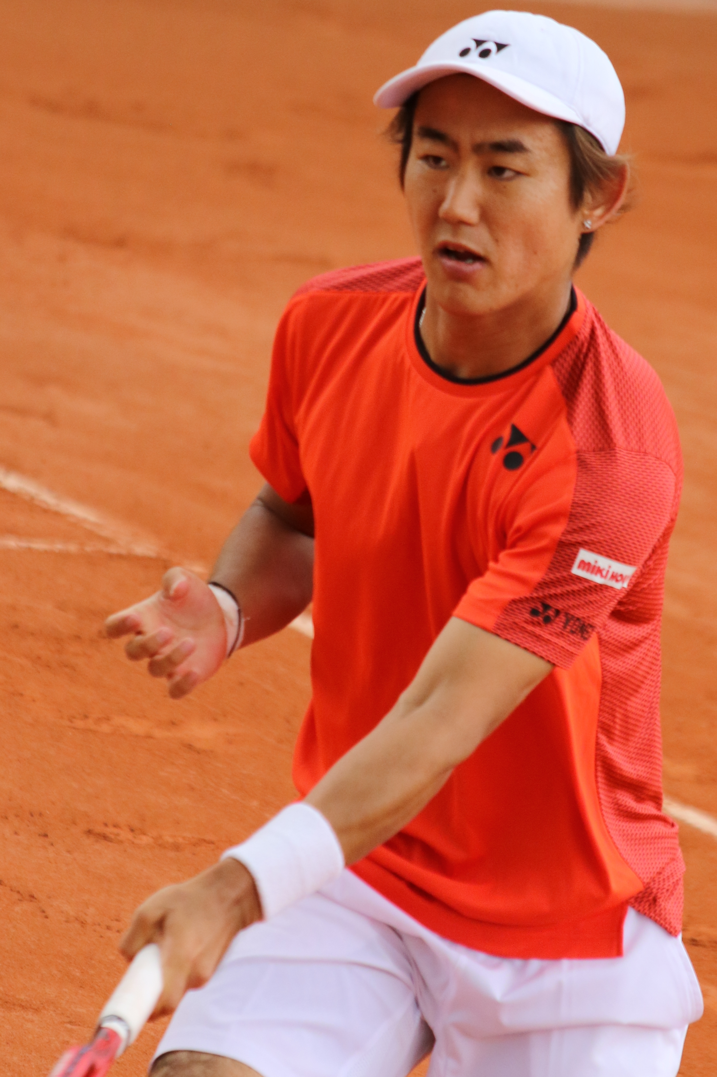 Nishioka RG19 (18)